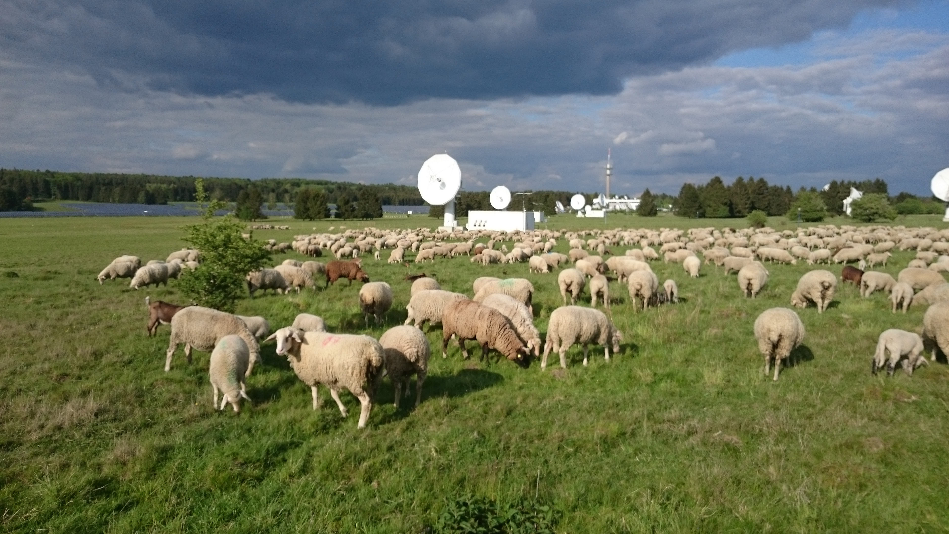 Schafe weiden auf der Erdfunkstelle